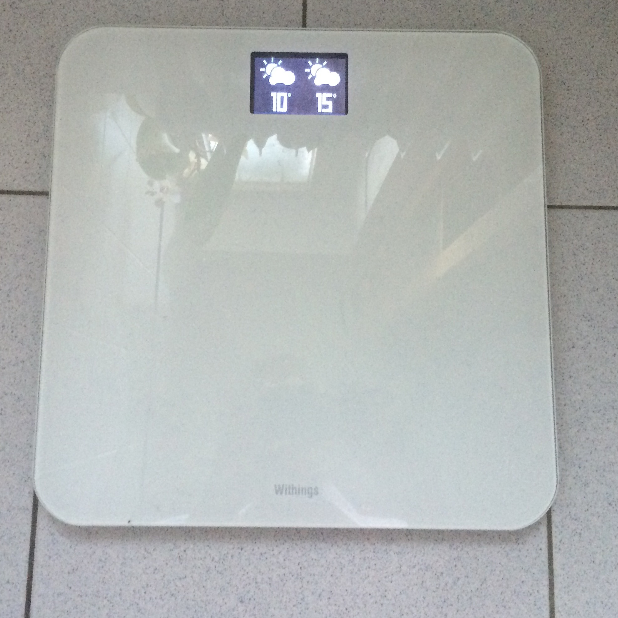 Die Withings-Waage WS30 mit Wetterinformationen über WiFi